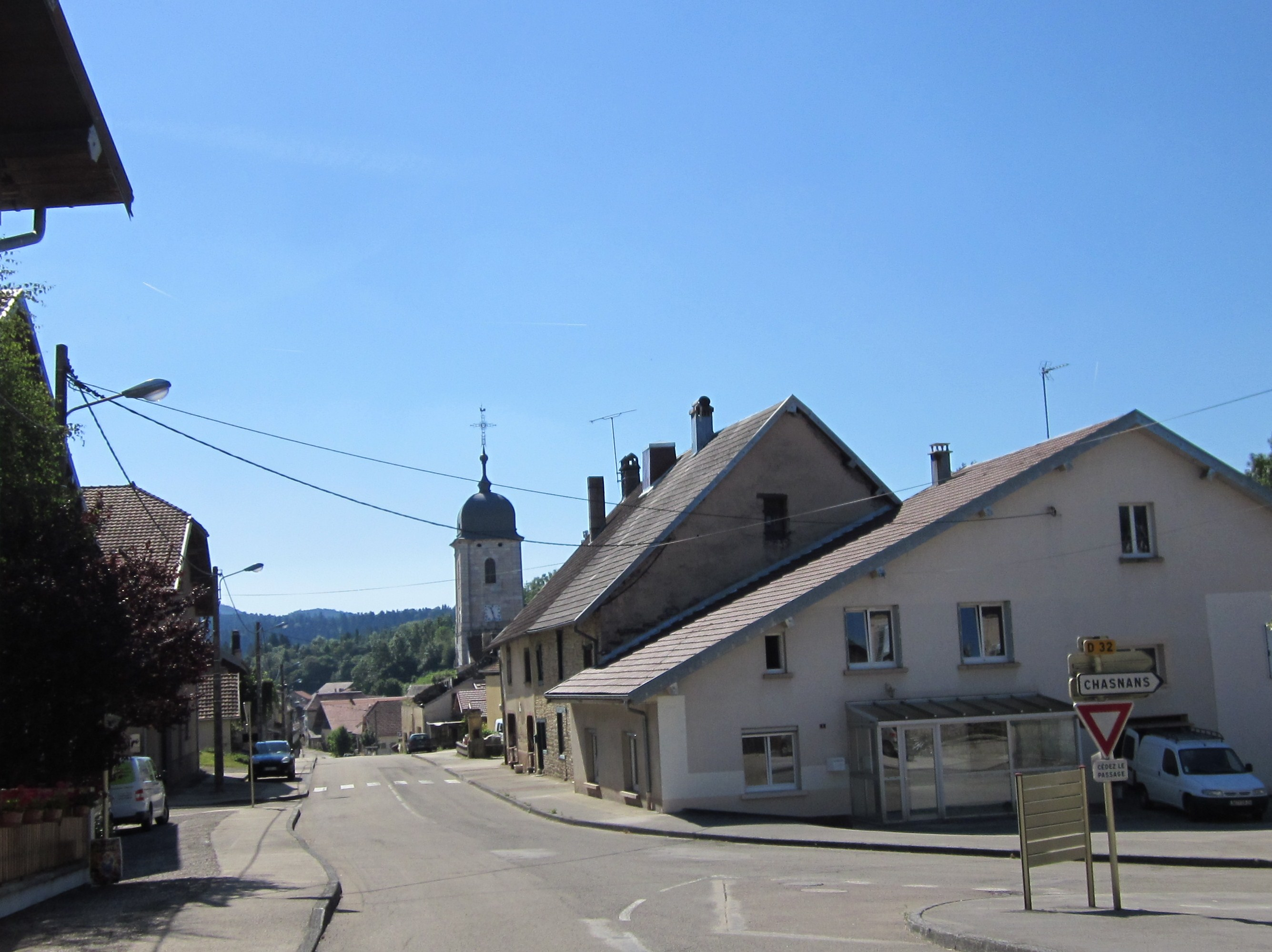 Nods (Doubs) -rue principale